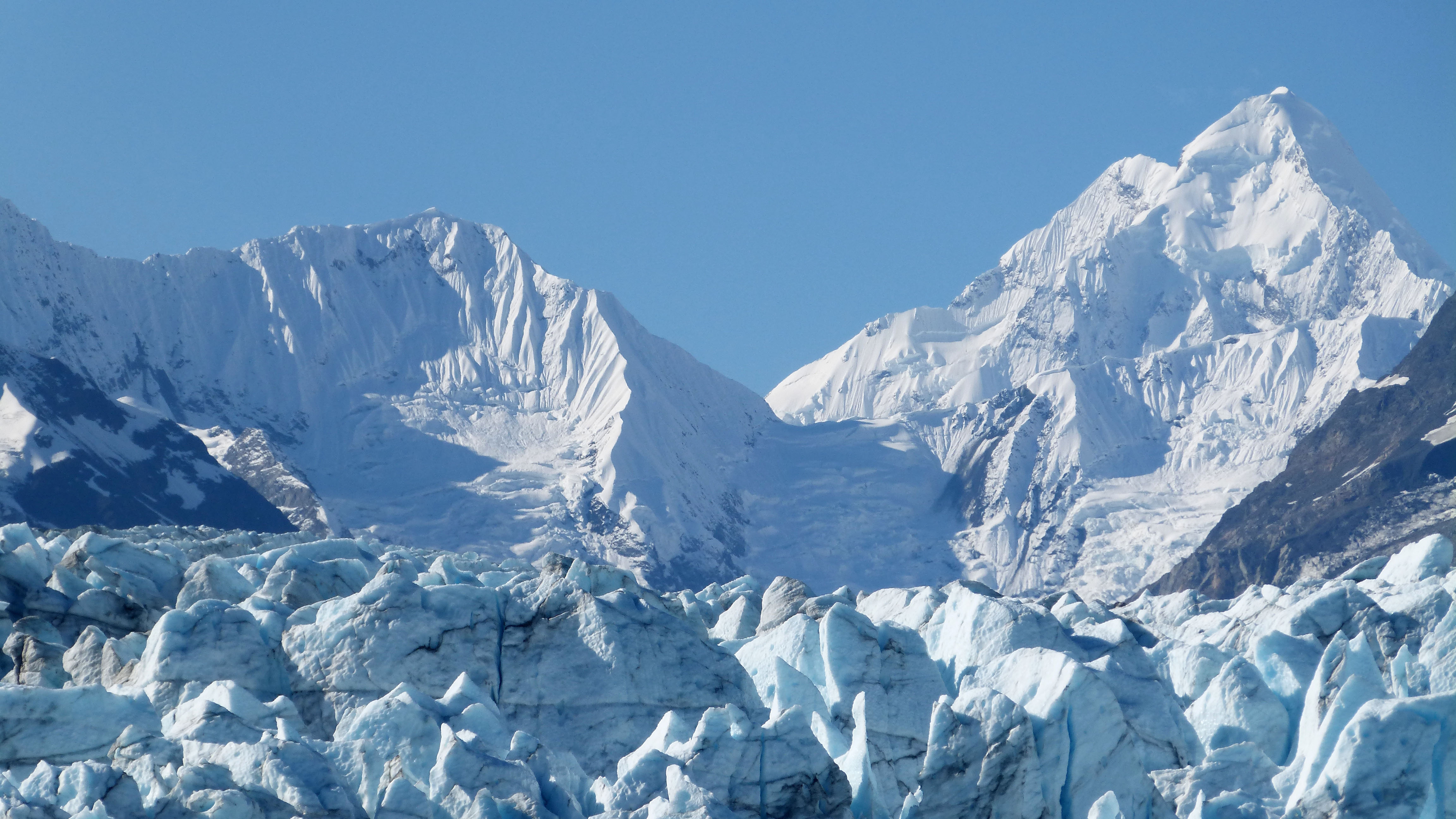 Glacier Bay Alaska